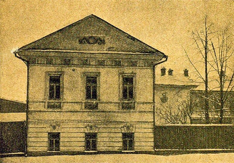 Бывший дом Групильон в Перми